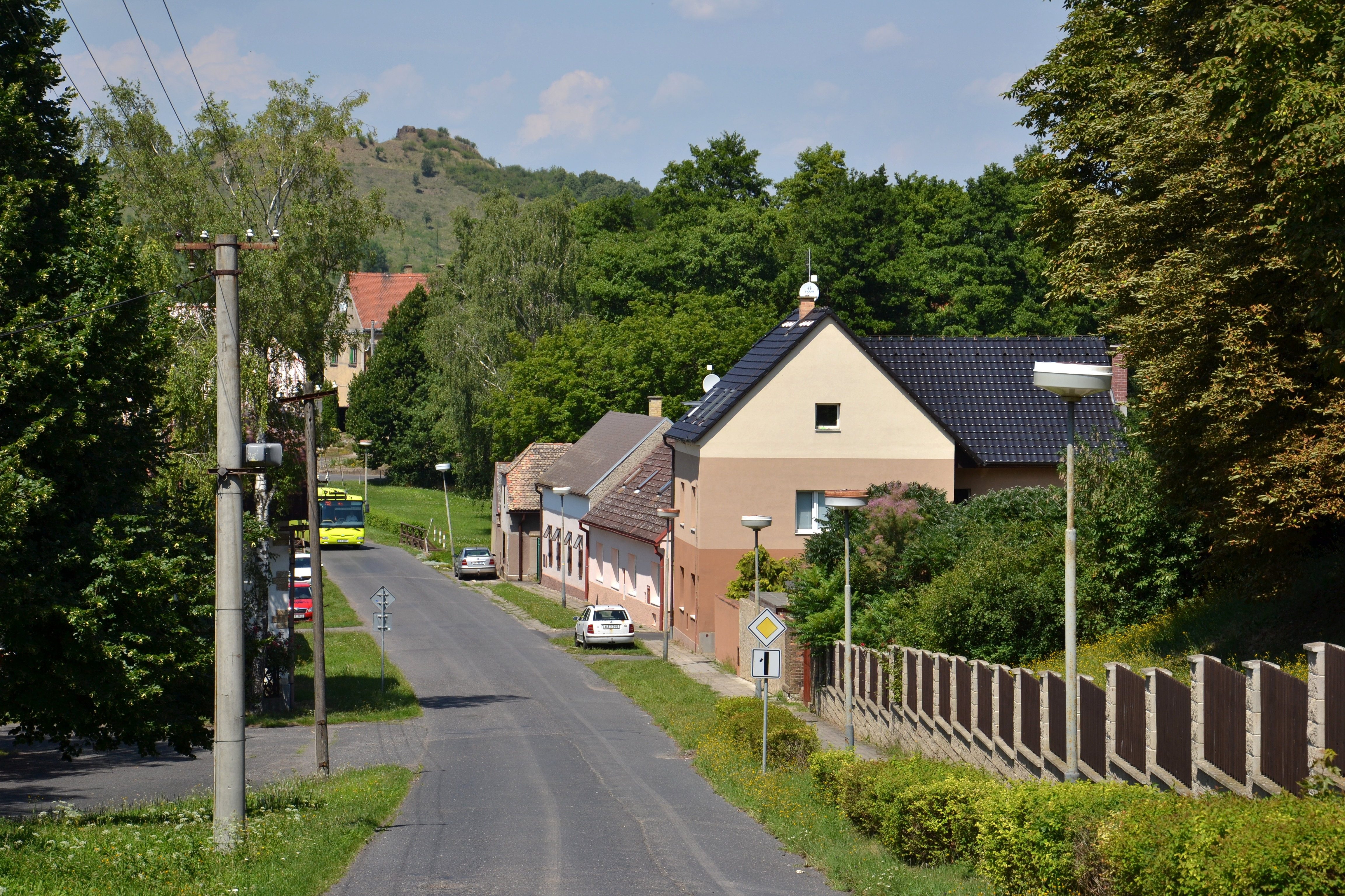 Chlumčany – ulice směrem k Blšanům